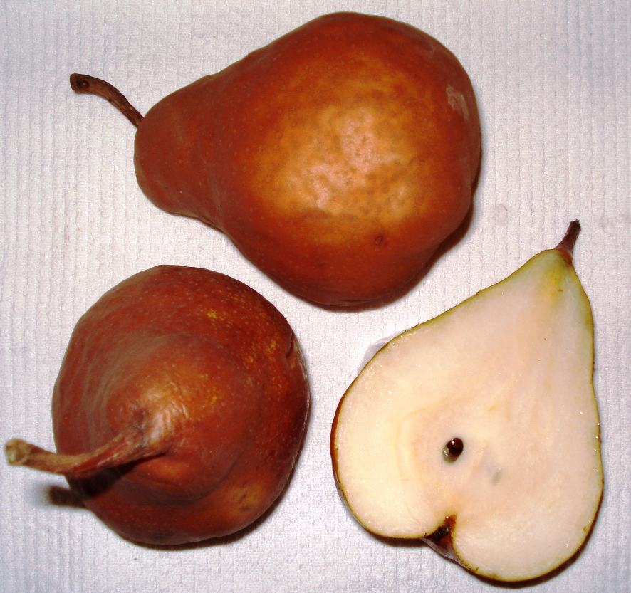 Birnen der Sorte "Boscs Flaschenbirne"